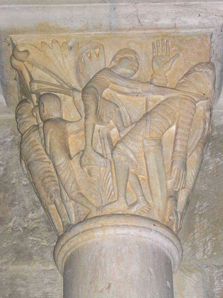 Vézelay. Photo de chapiteau (XIXè siècle) dans la nef de la basilique Sainte-Marie-Madeleine